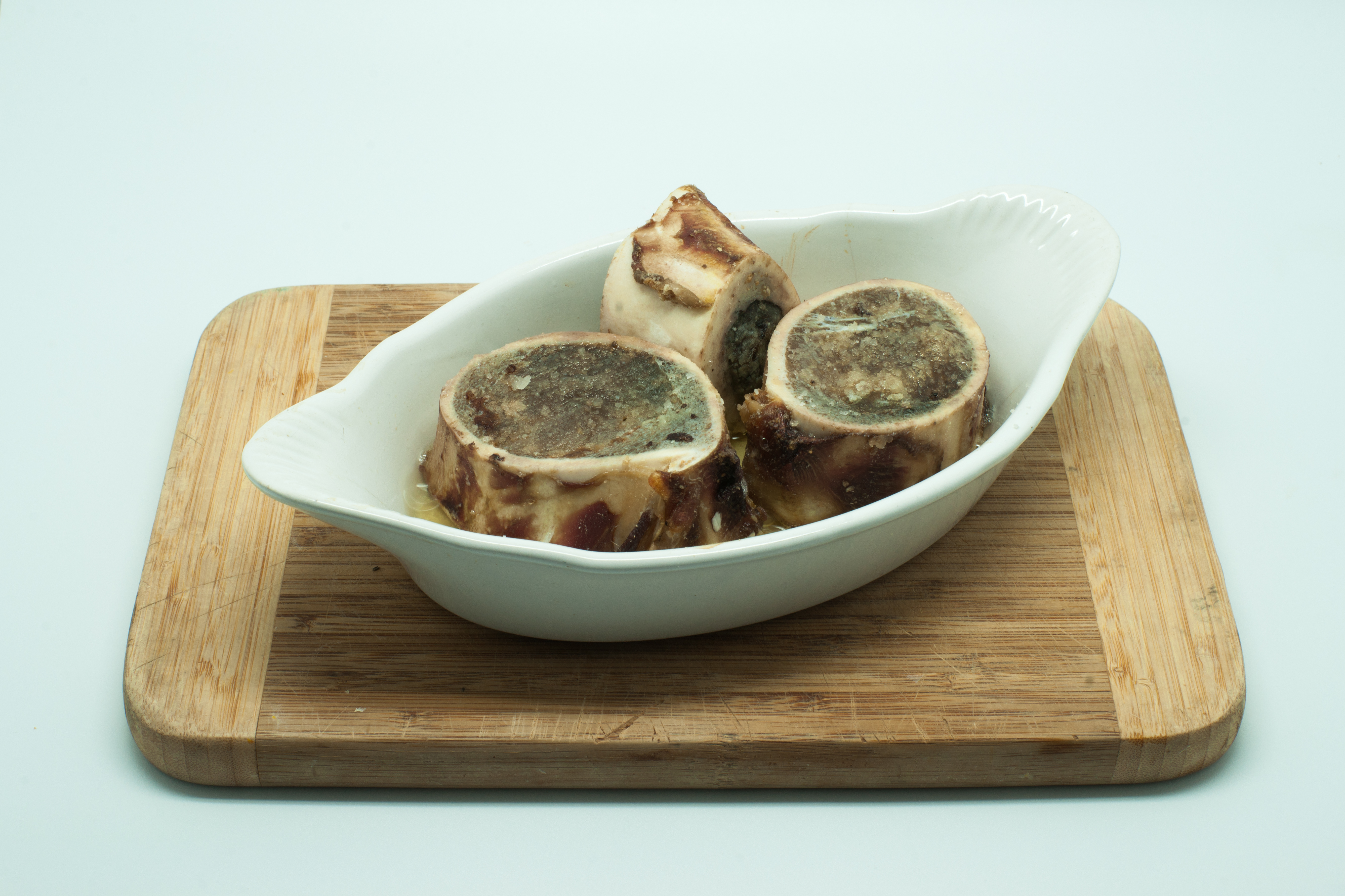 Os à moelle cuit au four.